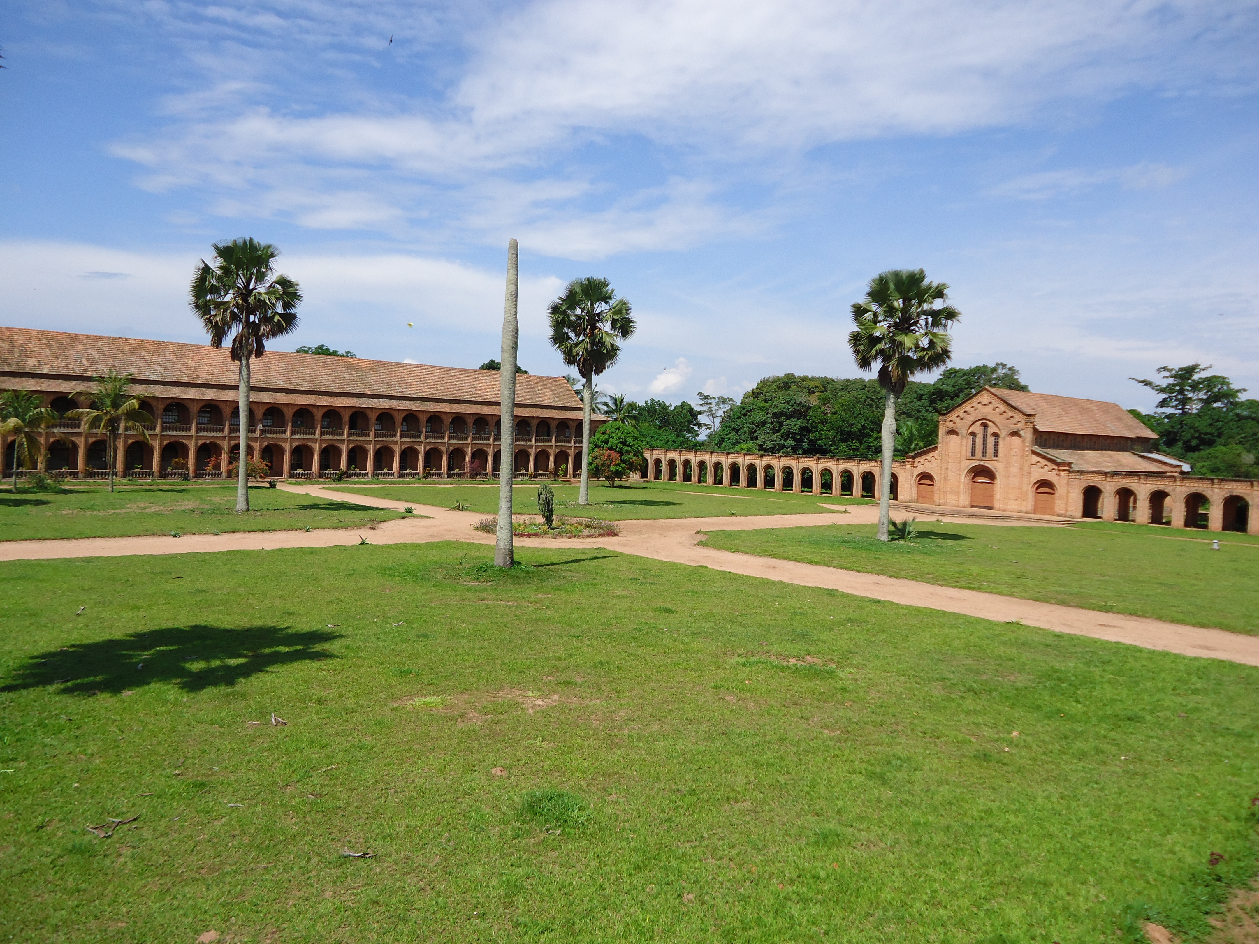 Grand Séminaire de Kabwe